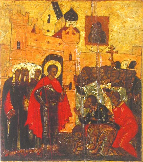 «Приезд Фёдора в Ярославль», 2-е клеймо иконы «Ярославские князья Федор, Давид и Константин в житии». Ярославский историко-архитектурный и художественный музей заповедник, Ярославль, Россия. Из церкви Чудотворцев Спасского монастыря в Ярославле.